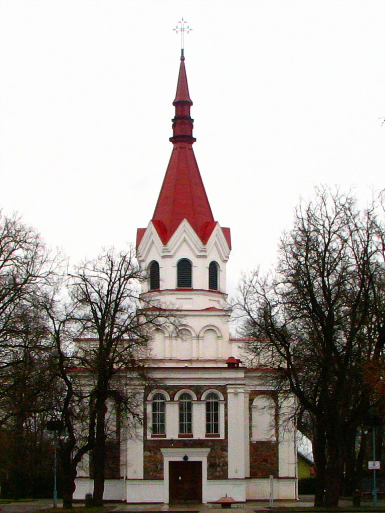 Panevezio Svc Trejybes baznycia